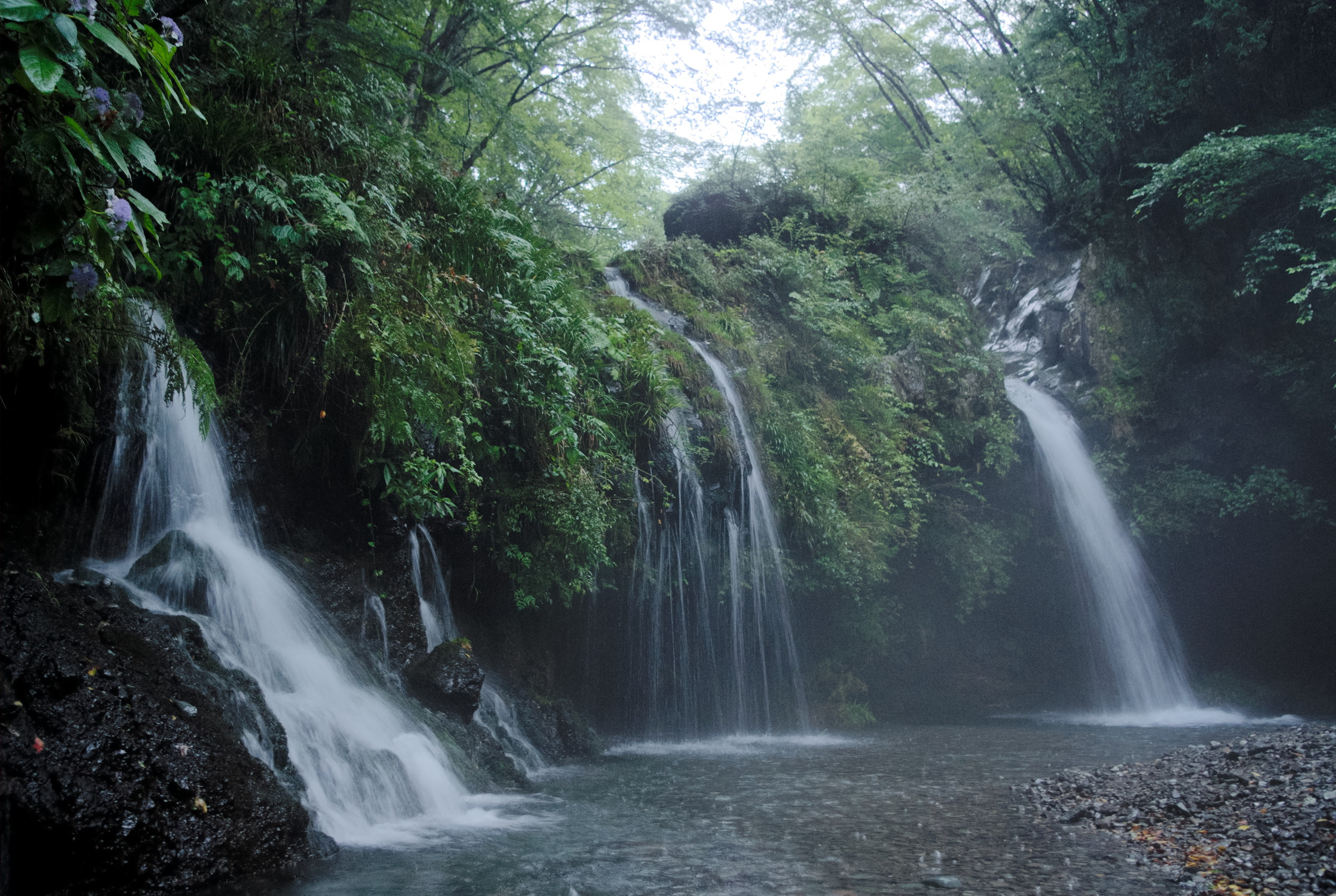 富士宮市にある陣馬の滝